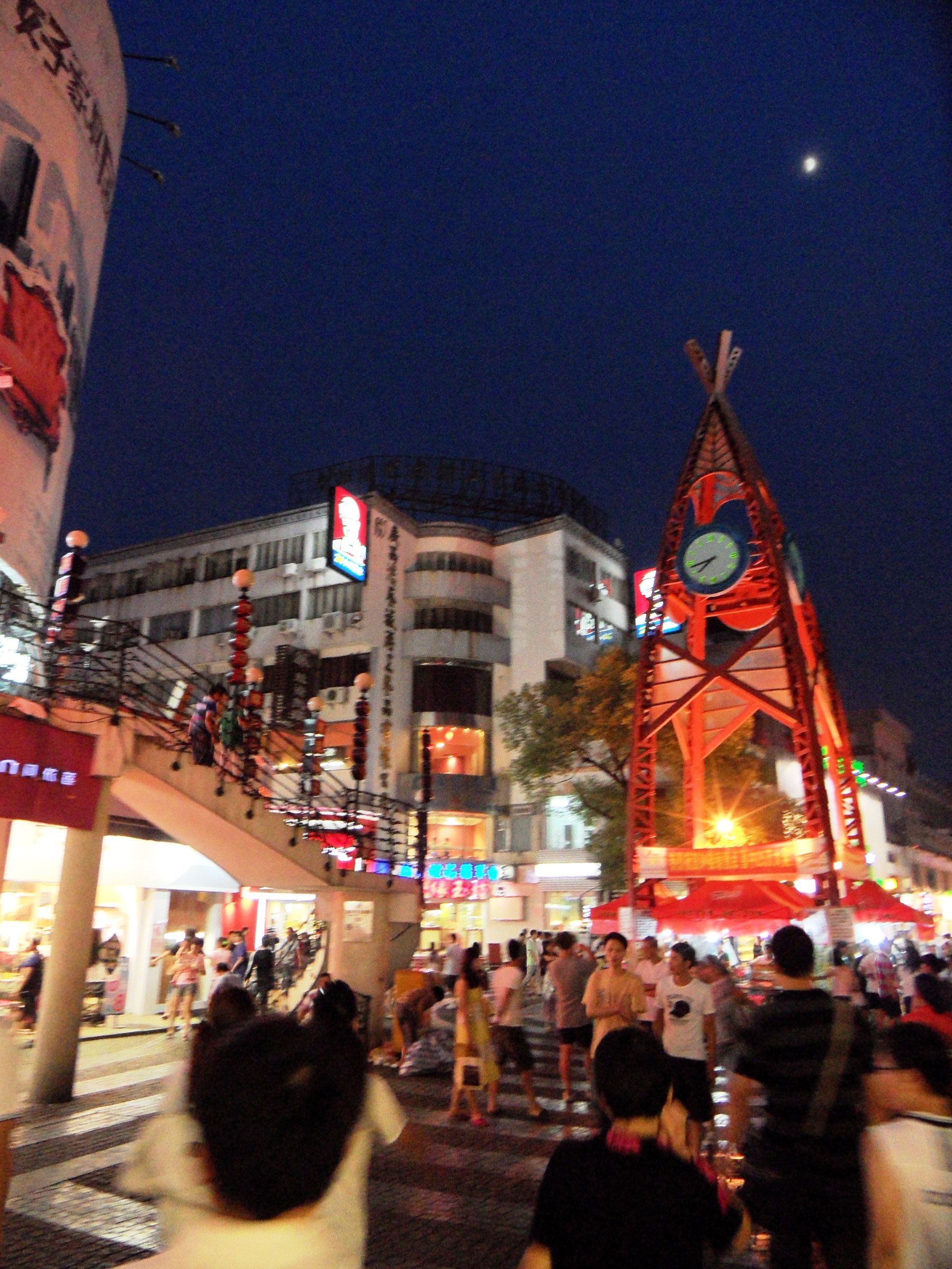 桂林市街道景色